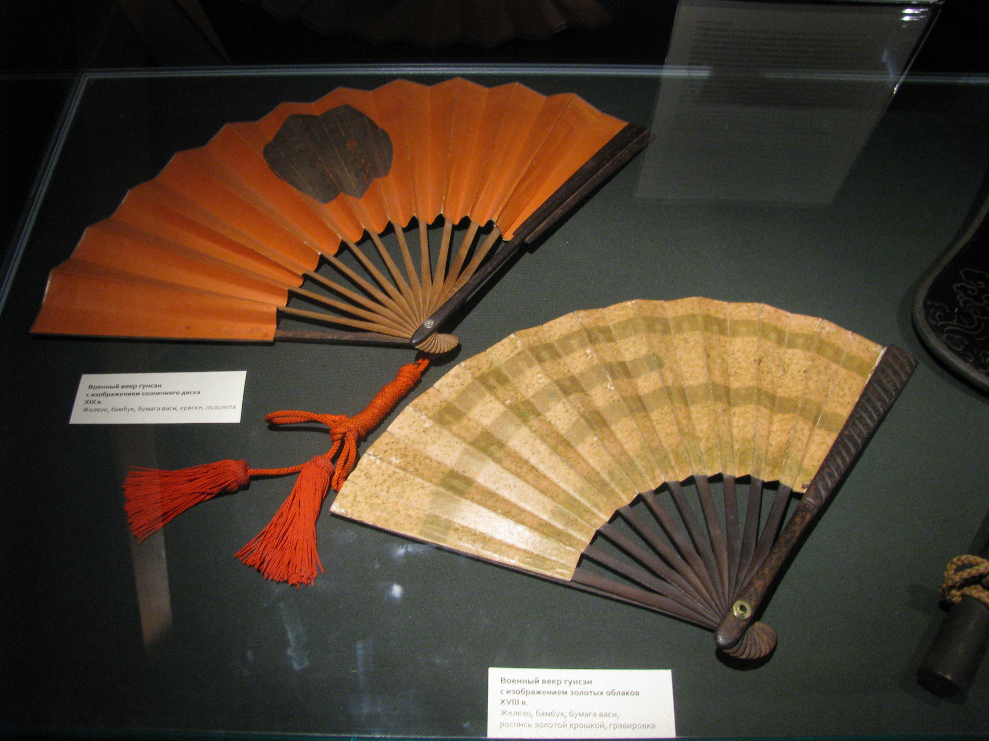 Японские военные вееры XIX и XVIII веков